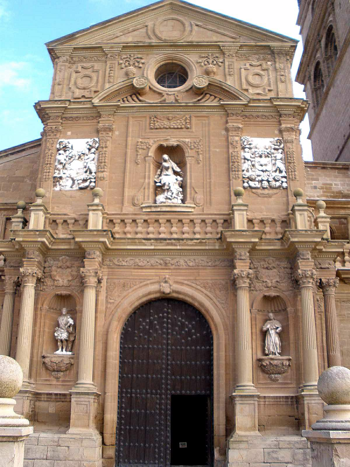 Catedral de Calahorra (La Rioja). Portada principal